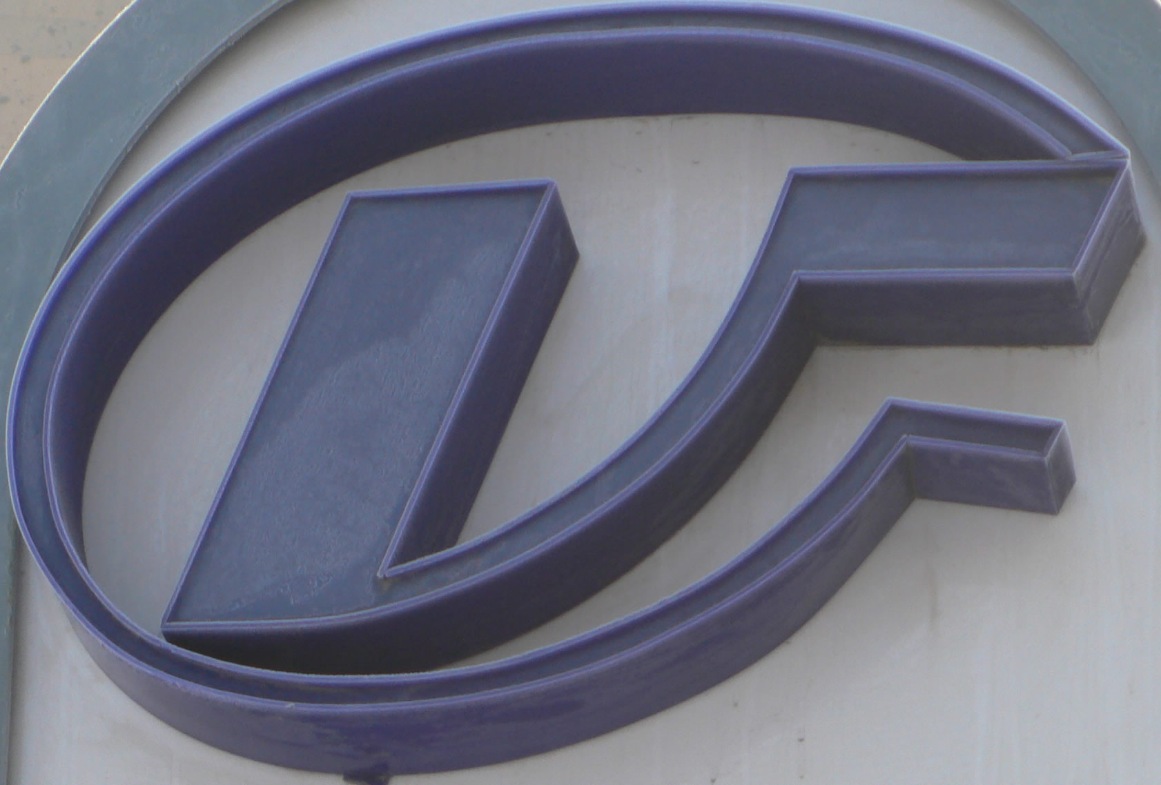 Logotype du métro d'Erevan